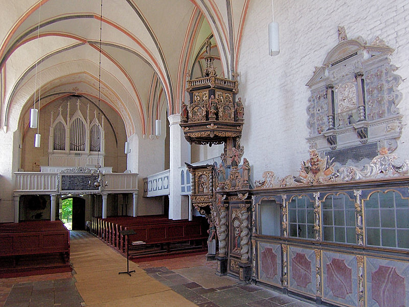 Kirche in Groß Mohrdorf, Innenraum, Mecklenburg-Vorpommern